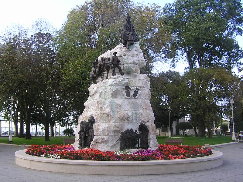 Monumento a Jose Maria de Pereda en Santander (Cantabria).